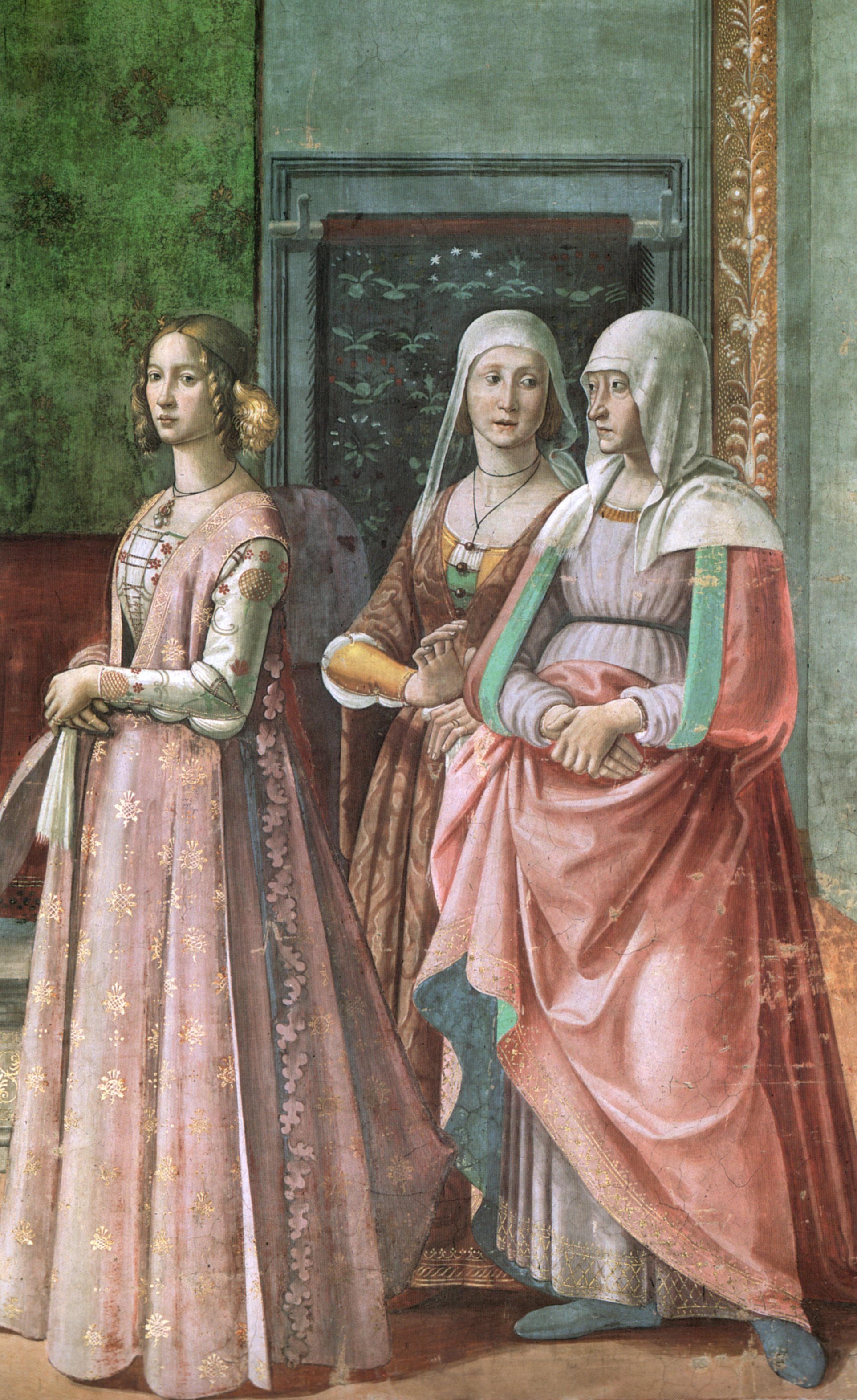 cappella tornabuoni frescoes in Florence